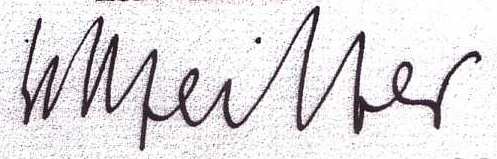 Helmut Pfeiffers Unterschrift 1942